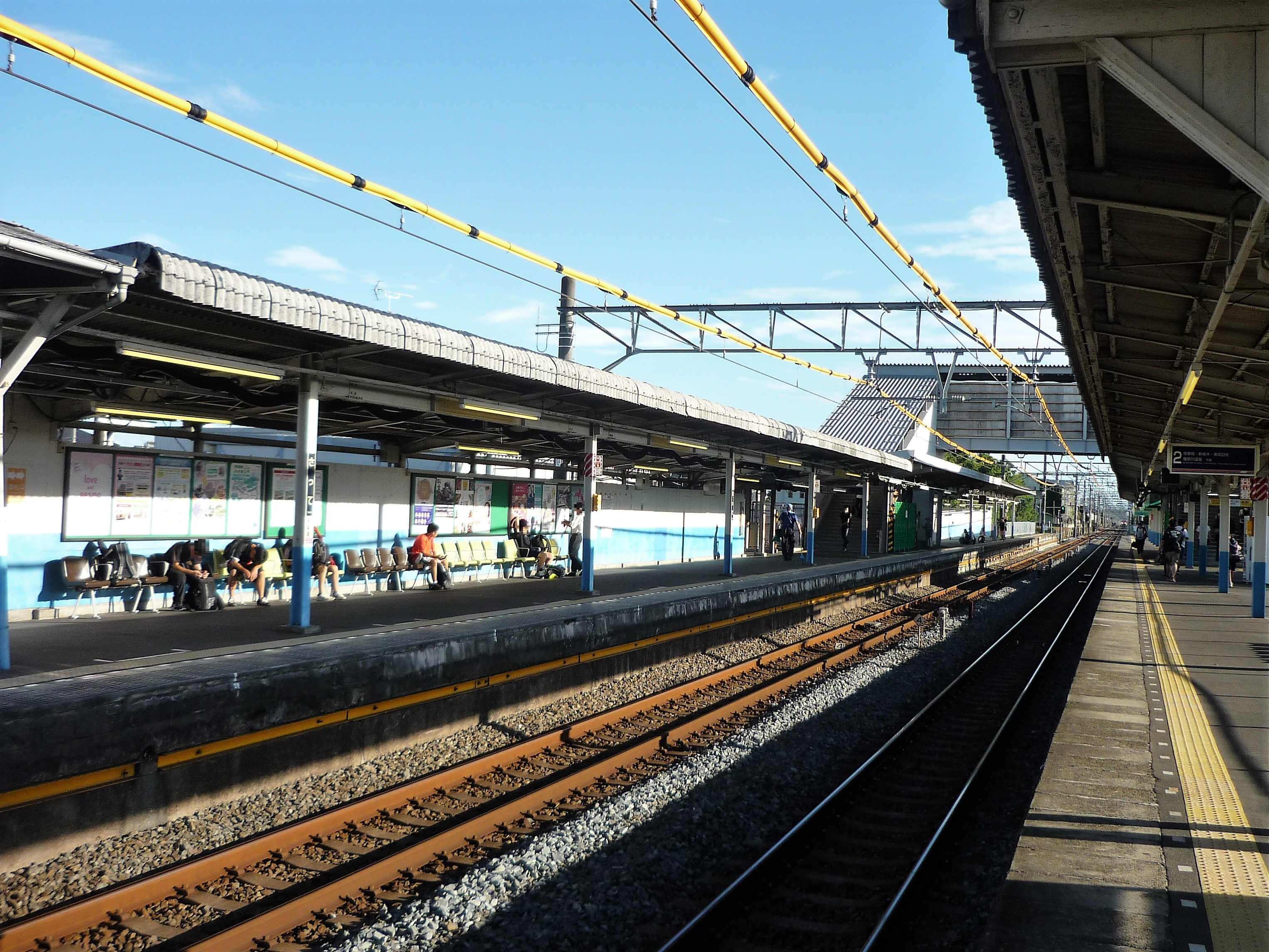 幸手駅ホーム（杉戸高野台駅方面を望む。左が1番線、右が2番線） Panasonic Lumix DMC-FS3